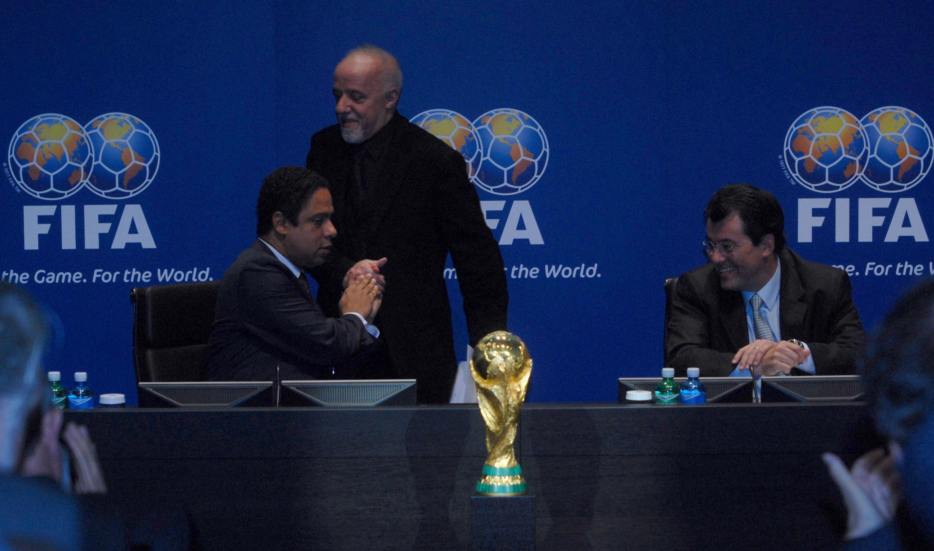 urique (Suíça) - O ministro do Esporte, Orlando Silva, cumprimenta o escritor Paulo Coelho na cerimônia de apresentação oficial da candidatura brasileira à Copa do Mundo de 2014. Ao lado, o governador do Amazonas, Eduardo Braga.